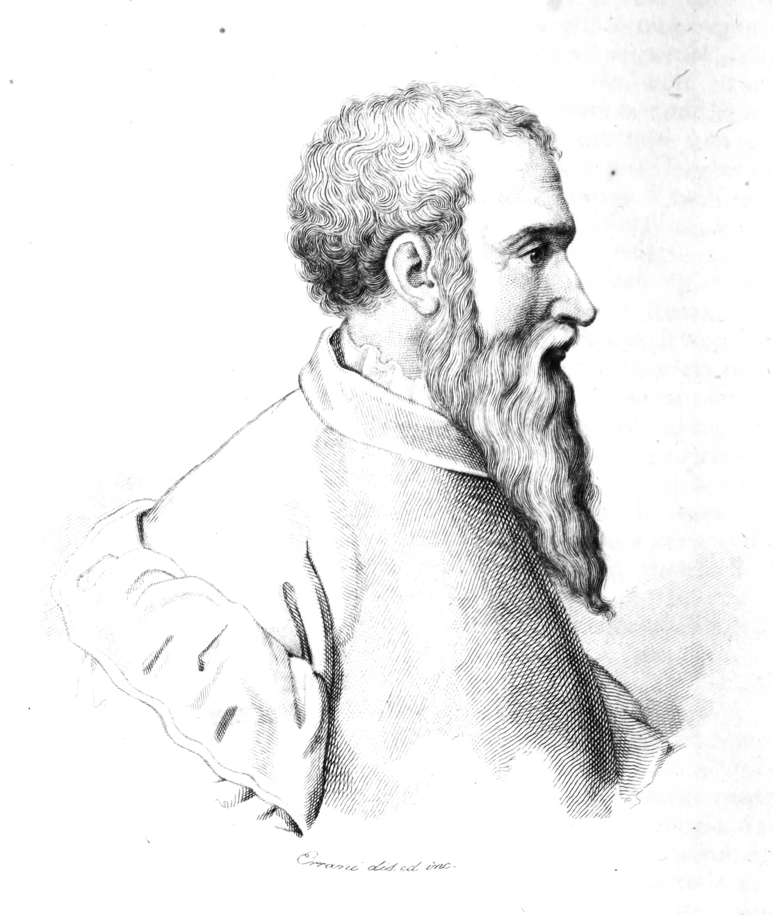 Innocenzo Francucci